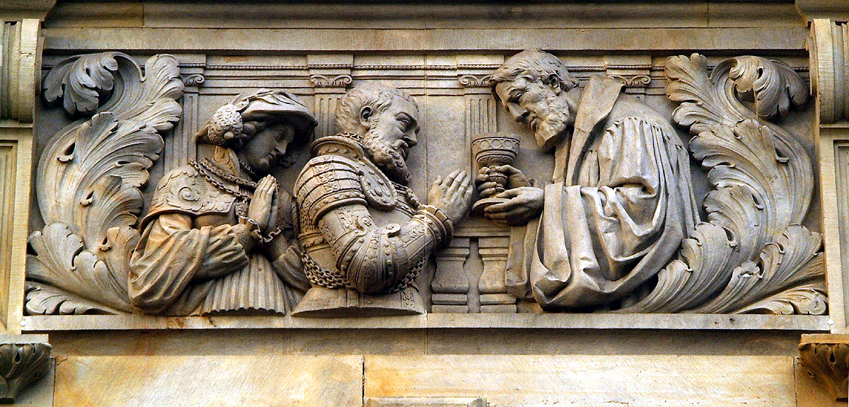 Im Jahr 1533 empfing Herzog Ernst der Bekenner das protestantische Abendmahl (Hinweis auf die bevorstehende Reformation und Bekenntnis zum Luthertum 1533); als Teil des halbplastischen Geschichts- oder auch "Bilderfrieses" am Neuen Rathaus in Hannover verewigte der Bildhauer Peter Schumacher das Thema ...